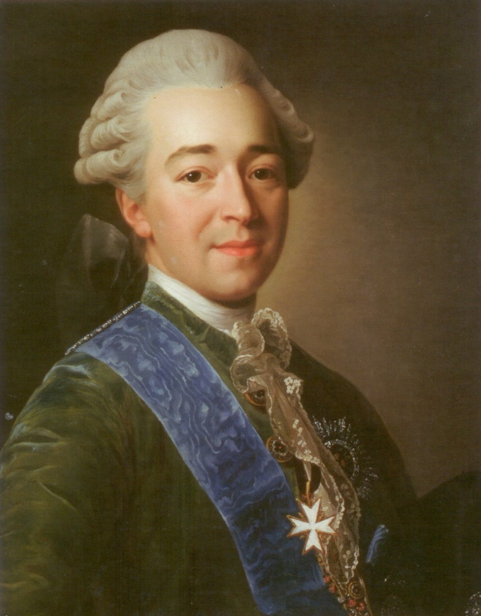 «Князь Алекса́ндр Бори́сович Кура́кин (1752 — 1818) — дипломат.»title QS:P1476,ru:"Князь Алекса́ндр Бори́сович Кура́кин (1752 — 1818) — дипломат." label QS:Lru,"Князь Алекса́ндр Бори́сович Кура́кин (1752 — 1818) — дипломат."